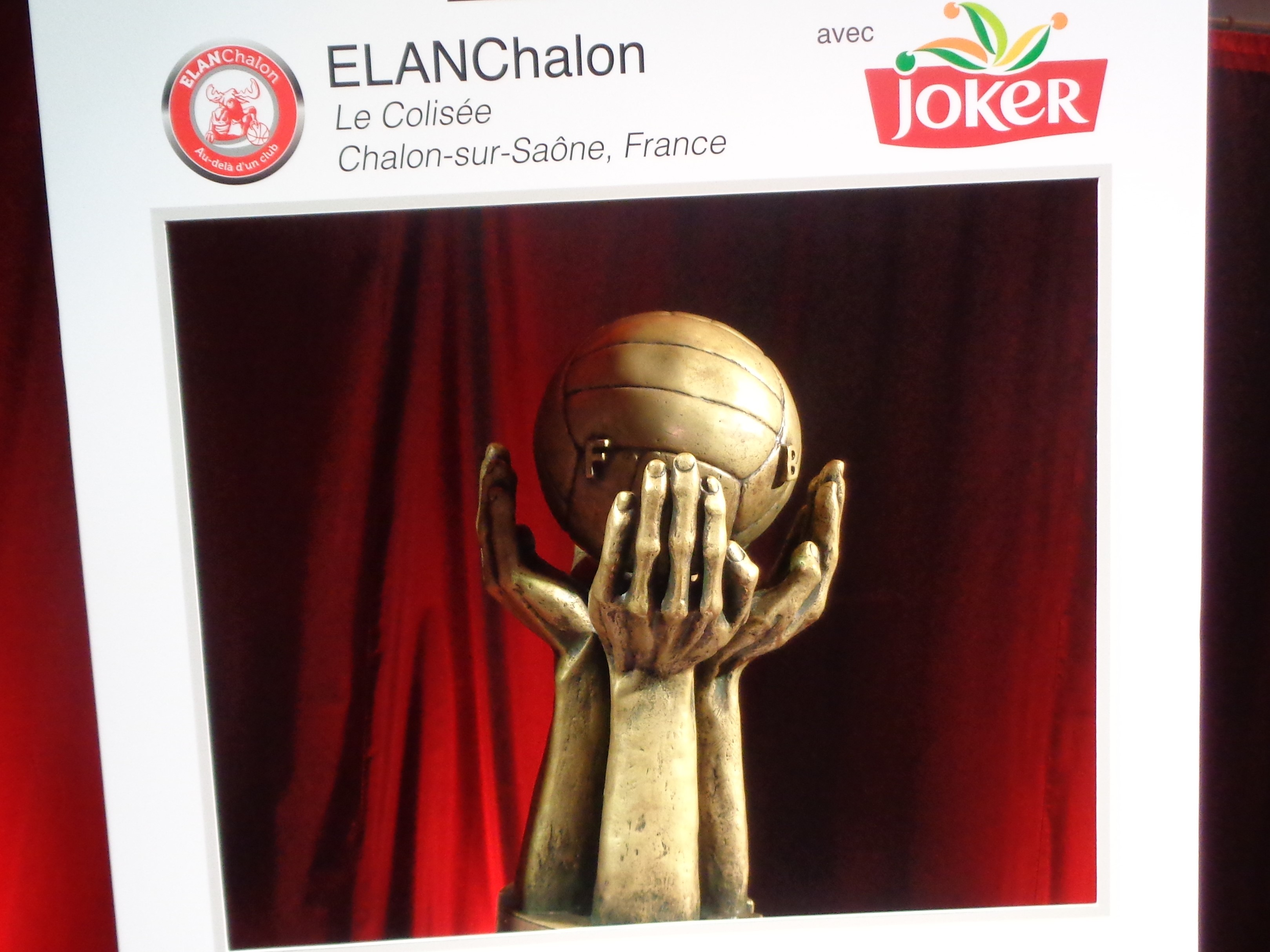 Match de Pro A (saison 2017-2018) entre l'Elan Chalon et l'Elan Béarnais au Colisée de Chalon-sur-Saône : Trophée de Champion de France 2017.